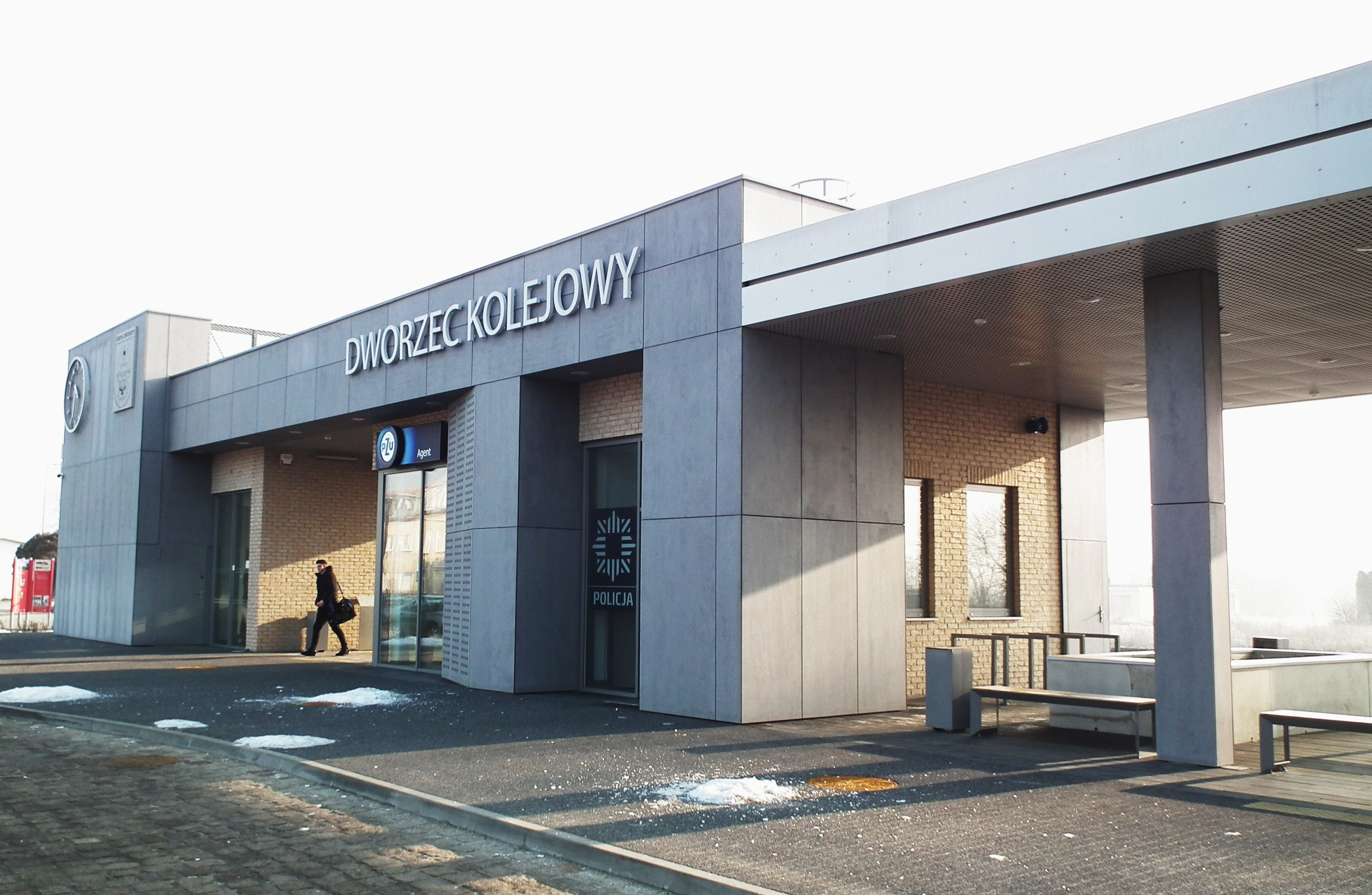 Dworzec Strzelce Krajeńskie Wschód w Zwierzynie.